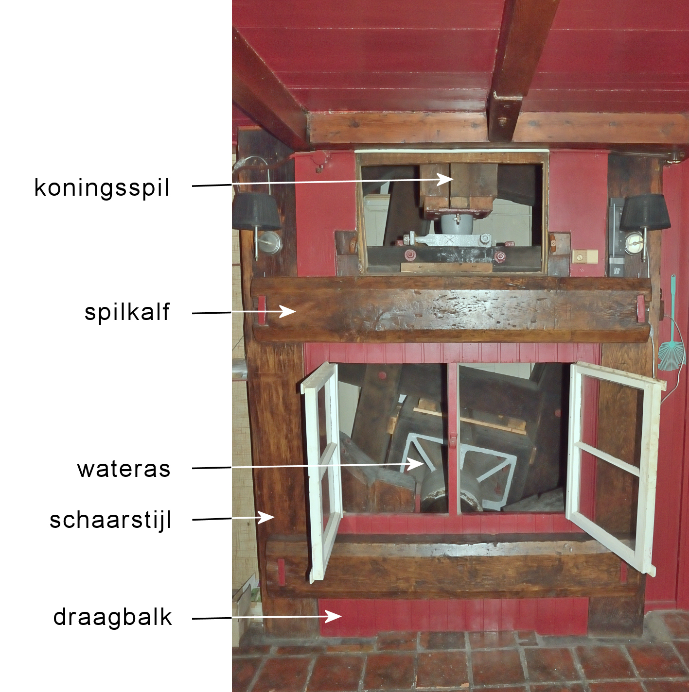 Laaglandse Molen, schaargebint met tekst